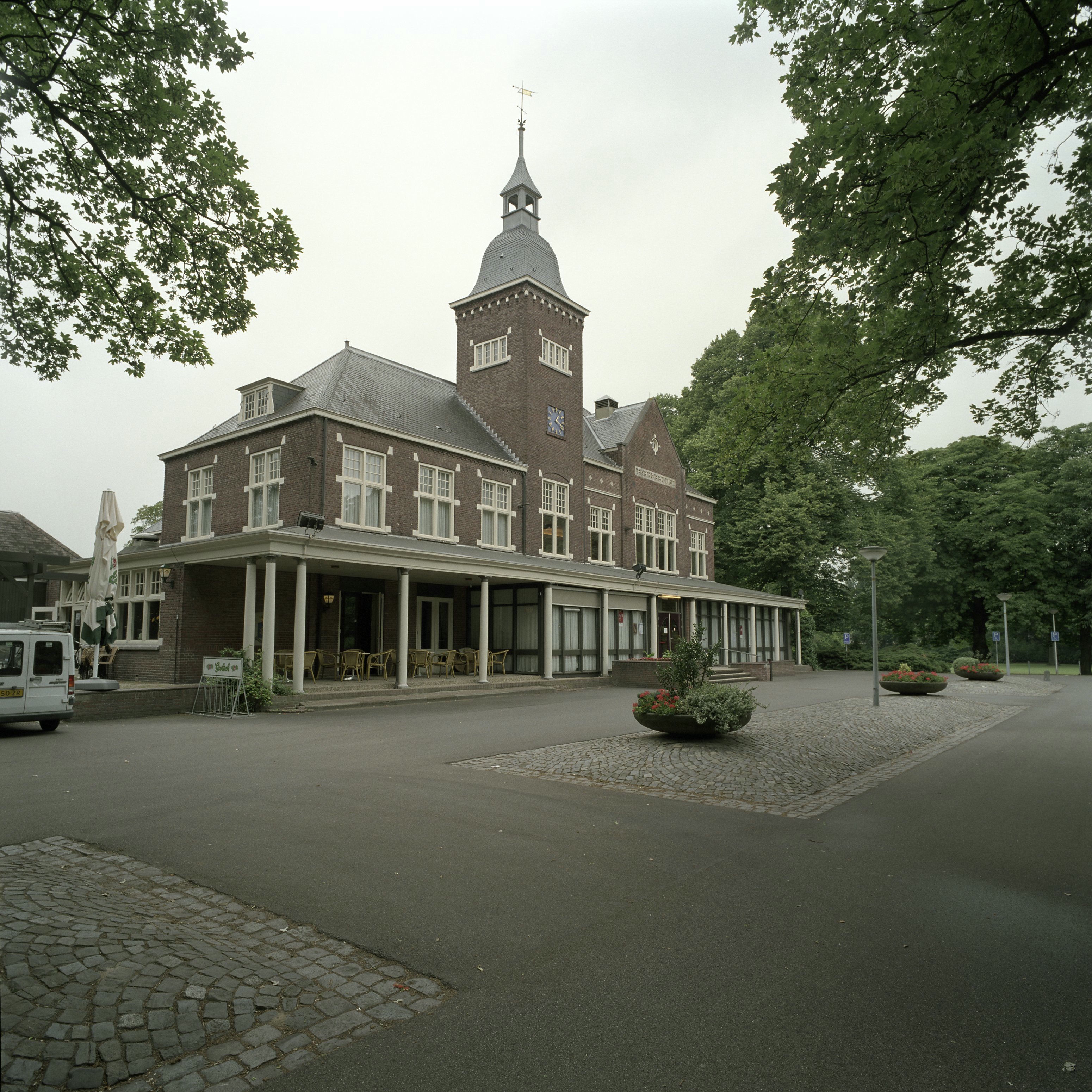 Parkhotel: Overzicht voorzijde van hotel